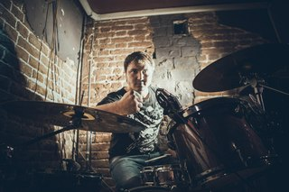 Александр "Исай" Исаев